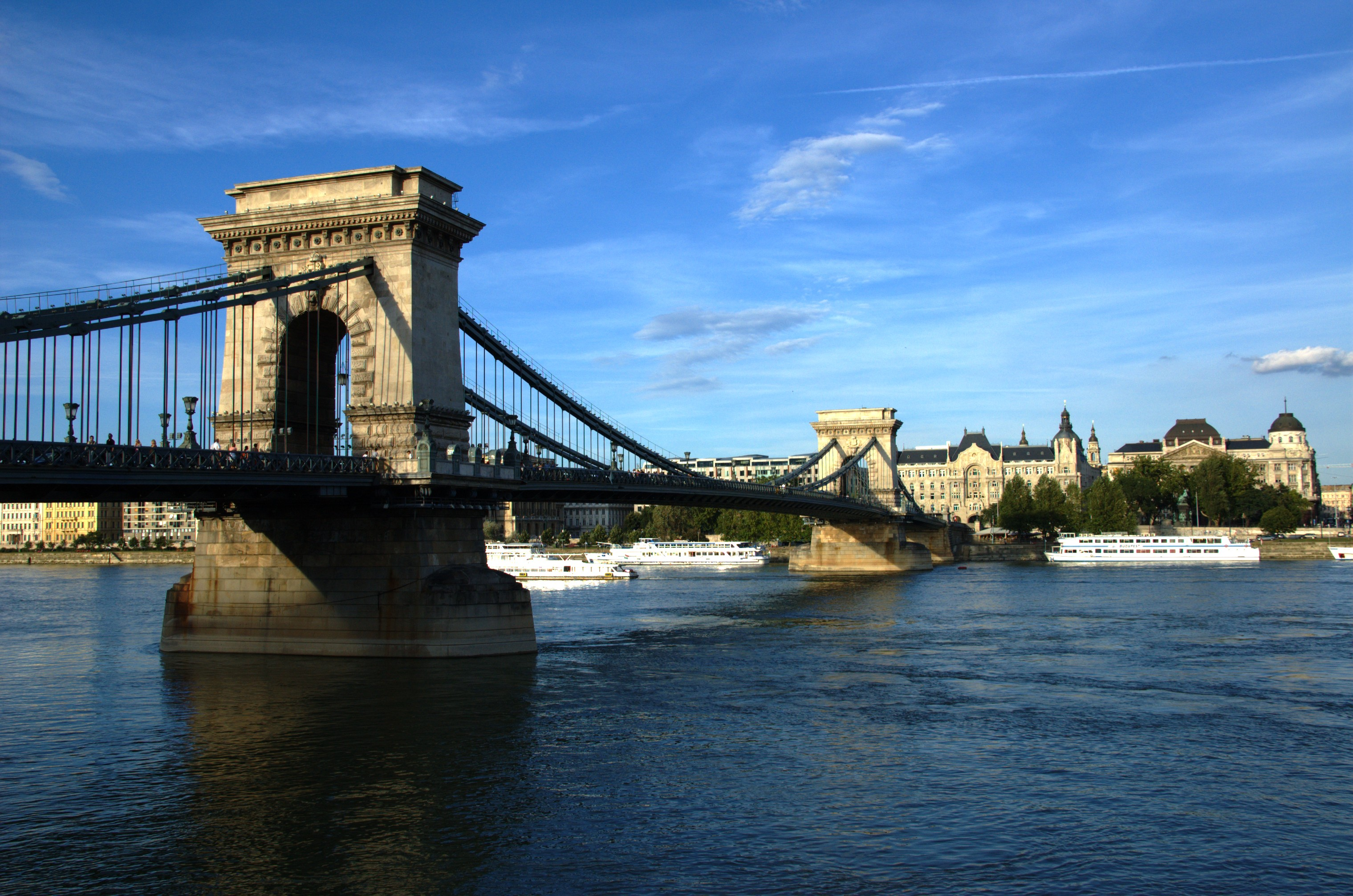 De bijzondere kettingbrug in de Hongaarse hoofdstad Budapest (Hongarije)